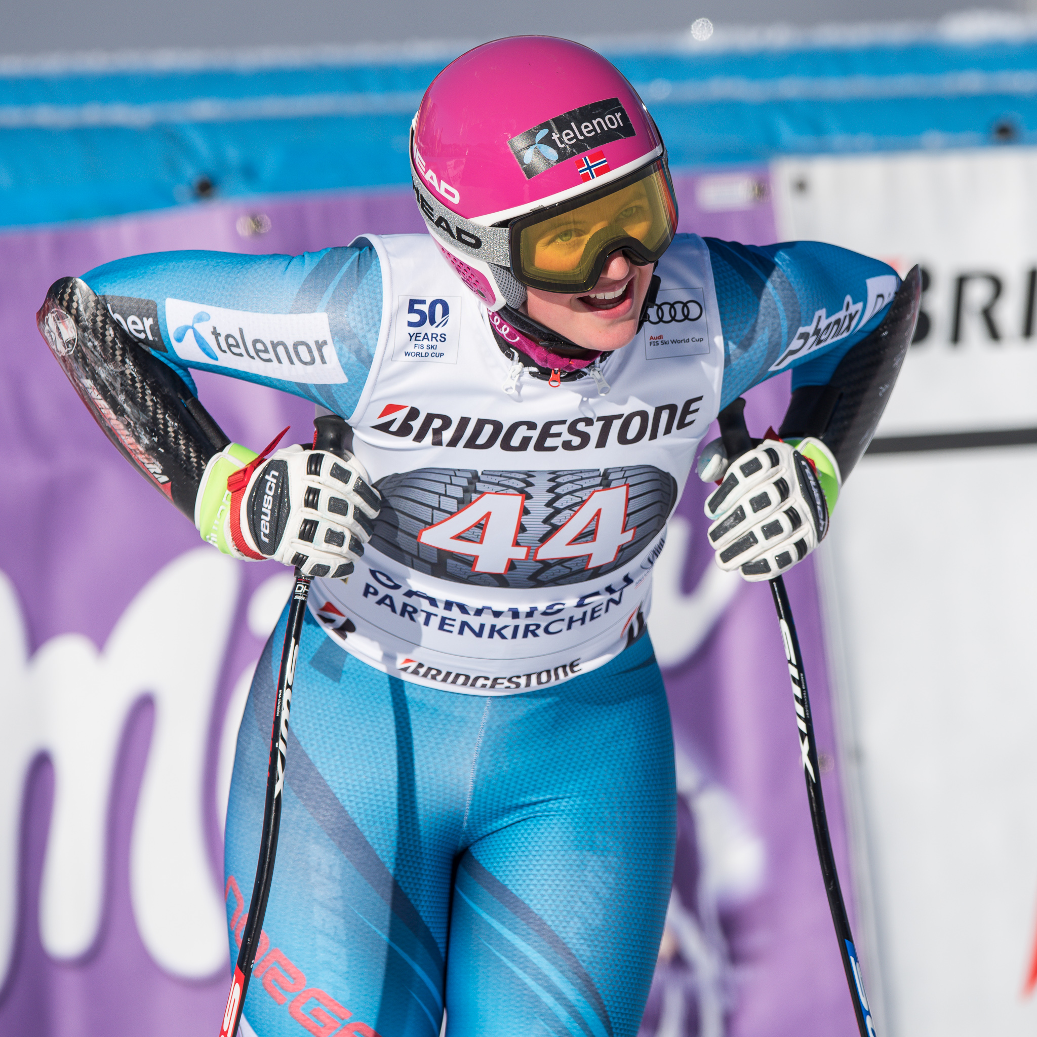 64. Kandahar Rennen,Audi FIS Ski Weltcup Garmisch-Partenkirchen,Damen Super-G,Kandahar,Ladies Super-G,Maria Therese Tviberg